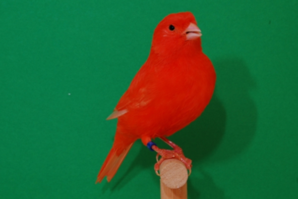 Farbenkanarie aufgehellt Rot intensiv